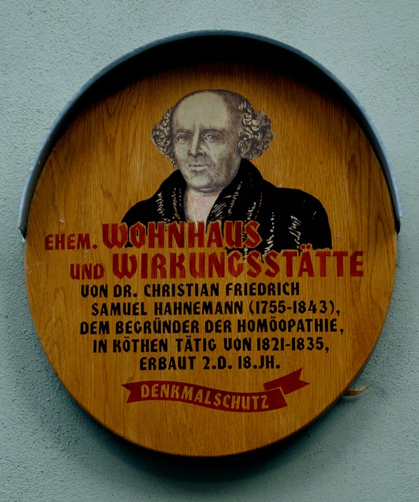 Gedenktafel am ehemaligen Wohnhaus von Samuel Hahnemann Köthen (Anhalt) in der Wallstraße. Hier lebte Hahnemann von 1821 bis 1835. Erbaut wurde das Gebäude im 18. Jahrhundert.